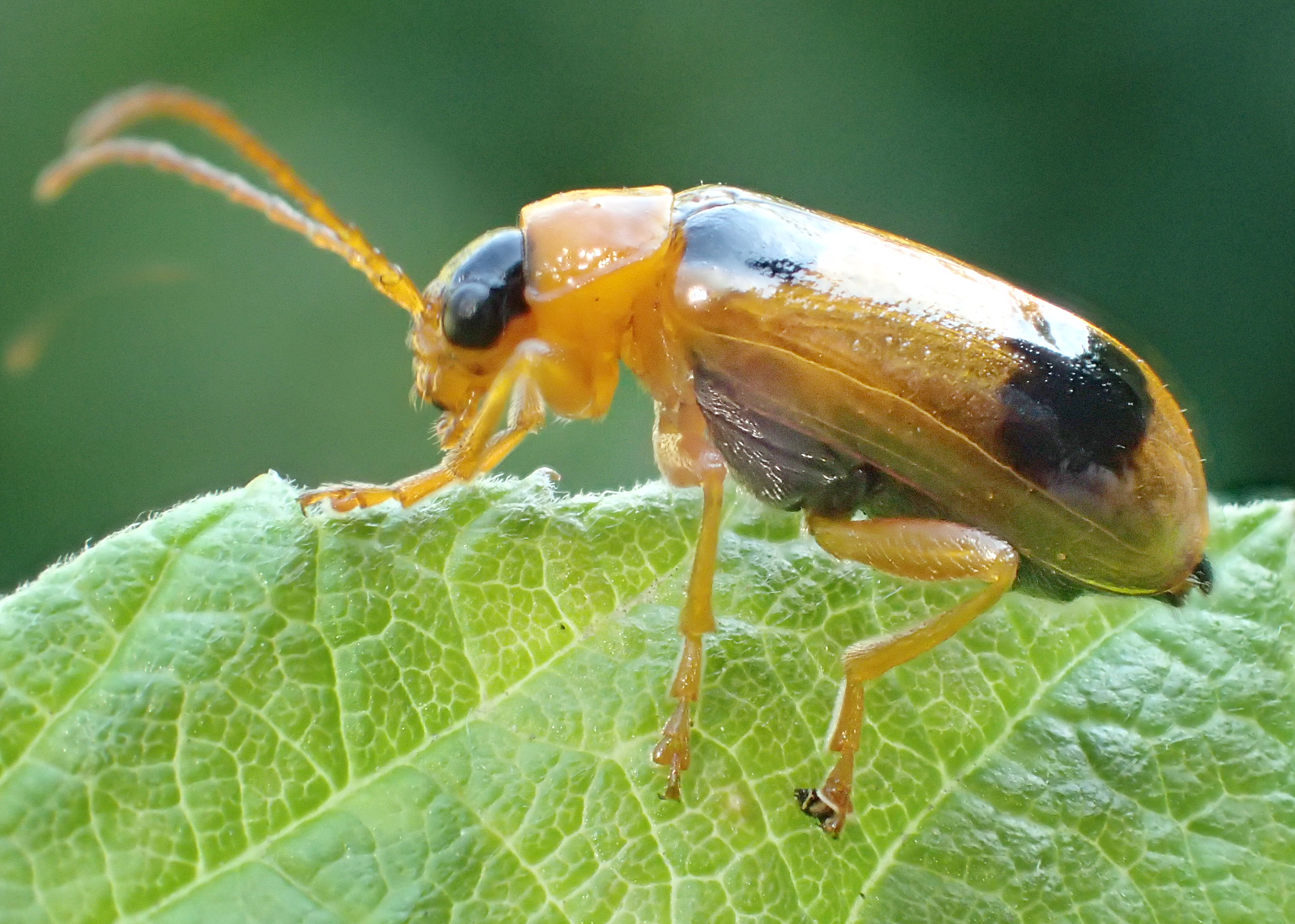 Phyllobrotica quadrimaculata bei 98701 Altenfeld, Harz am 5. Juli 2017, Seitenansicht